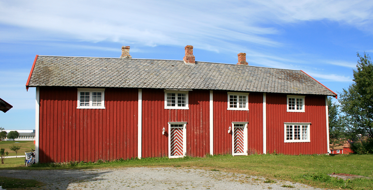 Borgstua, Herøy prestegard, Herøy, Nordland